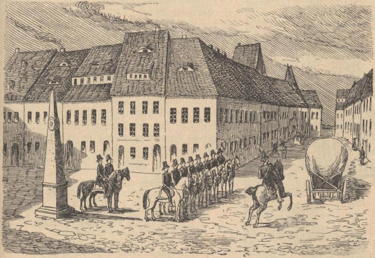 Beiträge zur Sächs. Volks- und Heimatkunde. Mit Zeichnungen von Professor O. Seyffert und Maler F. Rowland.